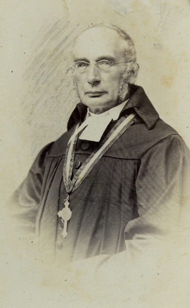 Woldemar Mickwitz (†1899), Maarja-Magdaleena praost